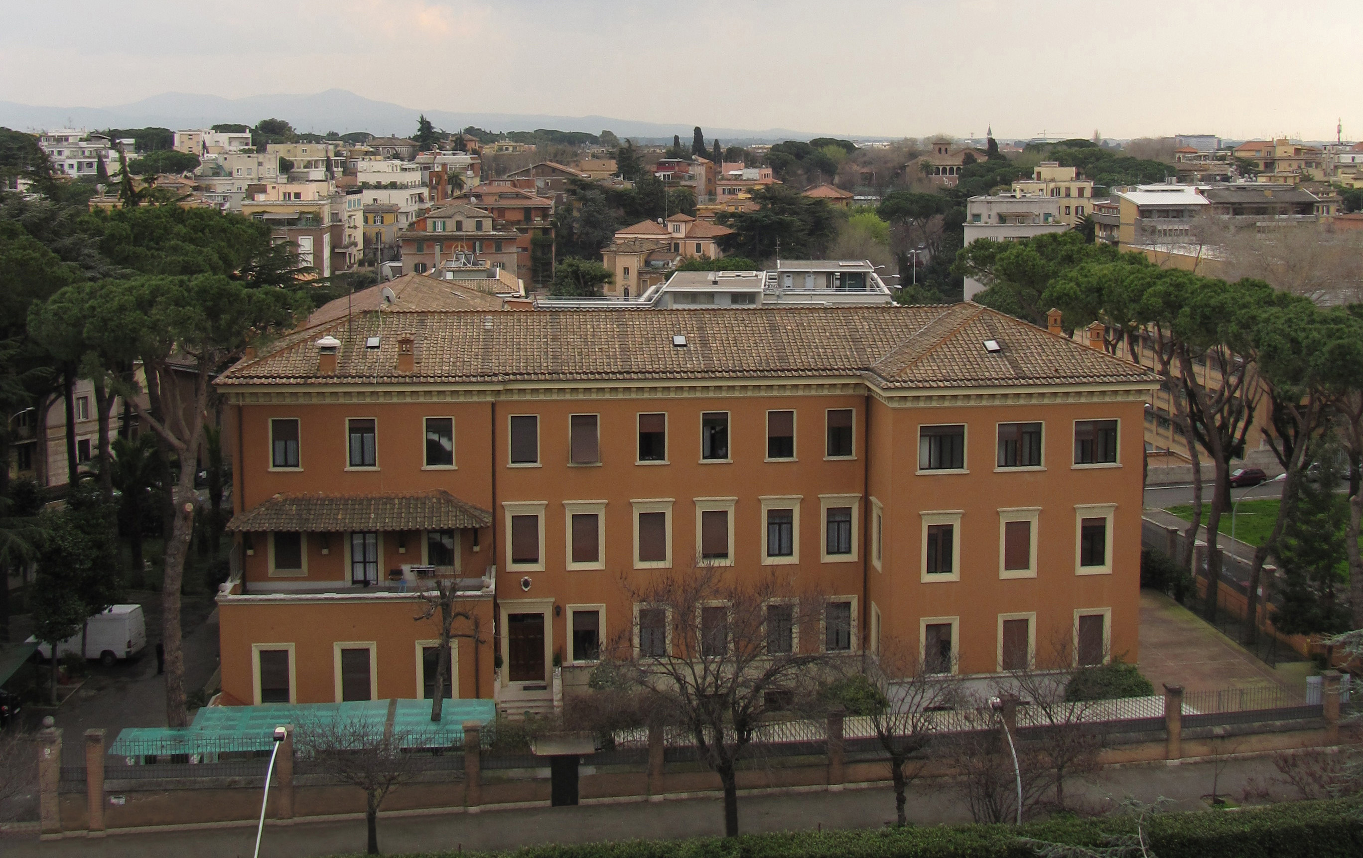 Монастир Христа Царя ЧСВВ в Римі